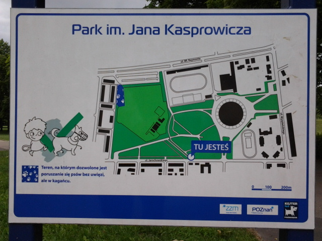 Park Kasprowicza w Poznaniu. Plan.